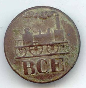 Knopf der Uniform eines Bediensteten der Bonn-Cölner-Eisenbahn